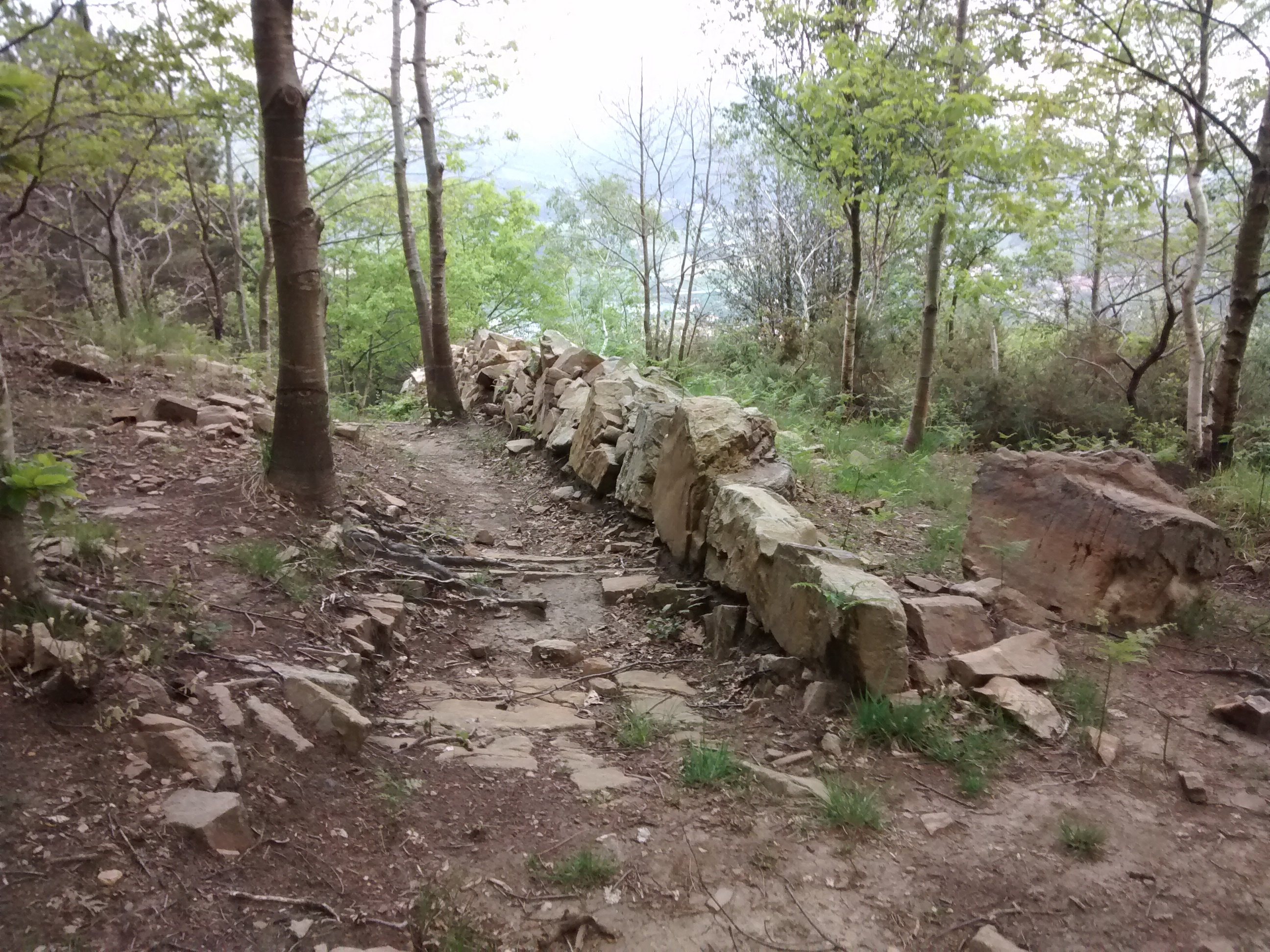 Belkoaingo mendebaldeko tontorretik gertu dagoen bigarren harresia. Bestea baino pixka bat beherago. Ustez lubaki bezala erabili zuten Gerra Zibilean.